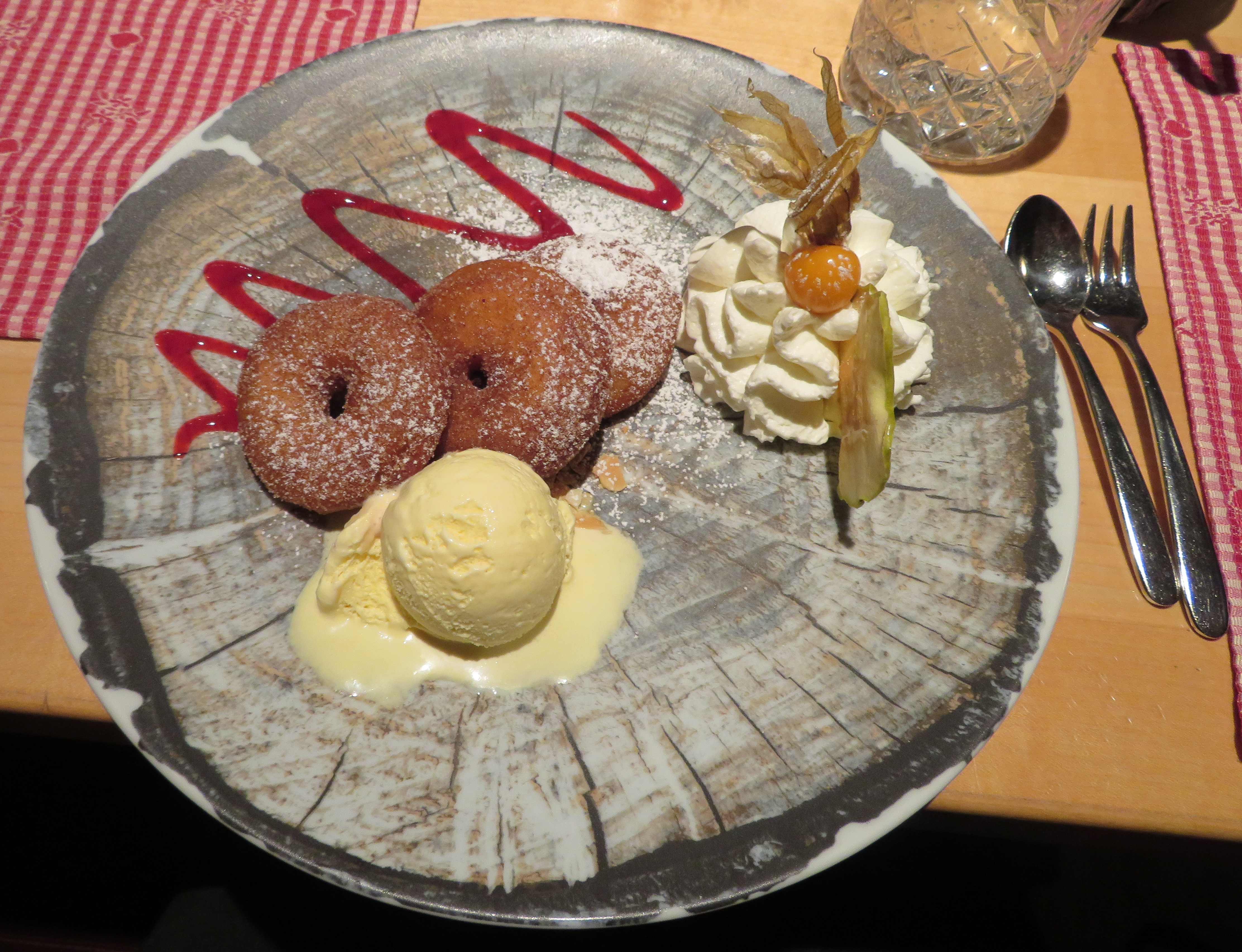 Apfelküchle mit Vanilleeis und Sahne